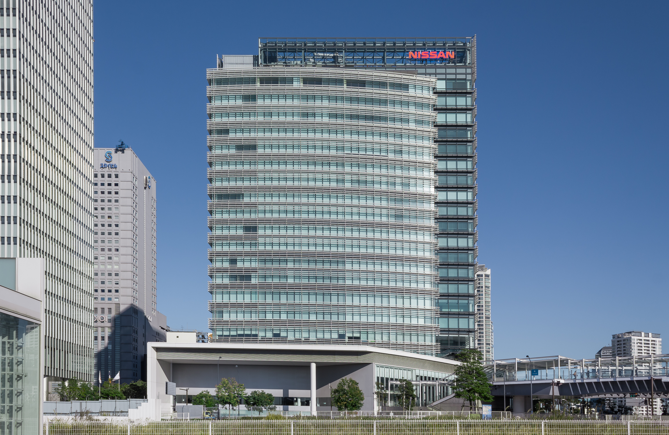 日産自動車グローバル本社（神奈川県横浜市）